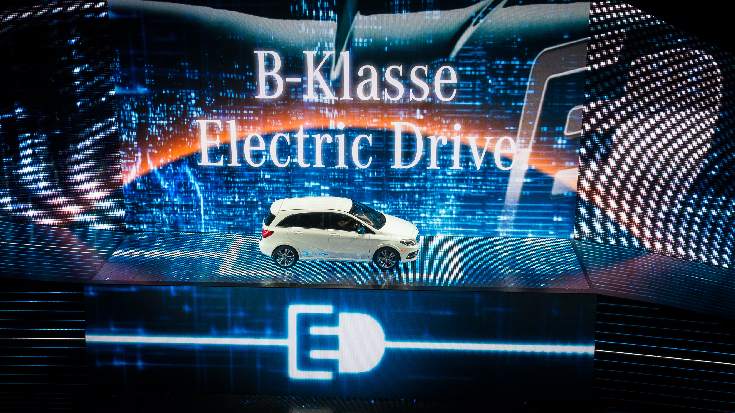 Präsentation der Mercedes-Benz B-Klasse Electric Drive auf der IAA 2013 in Frankfurt am Main.